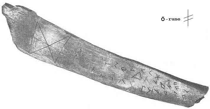 руническая надпись